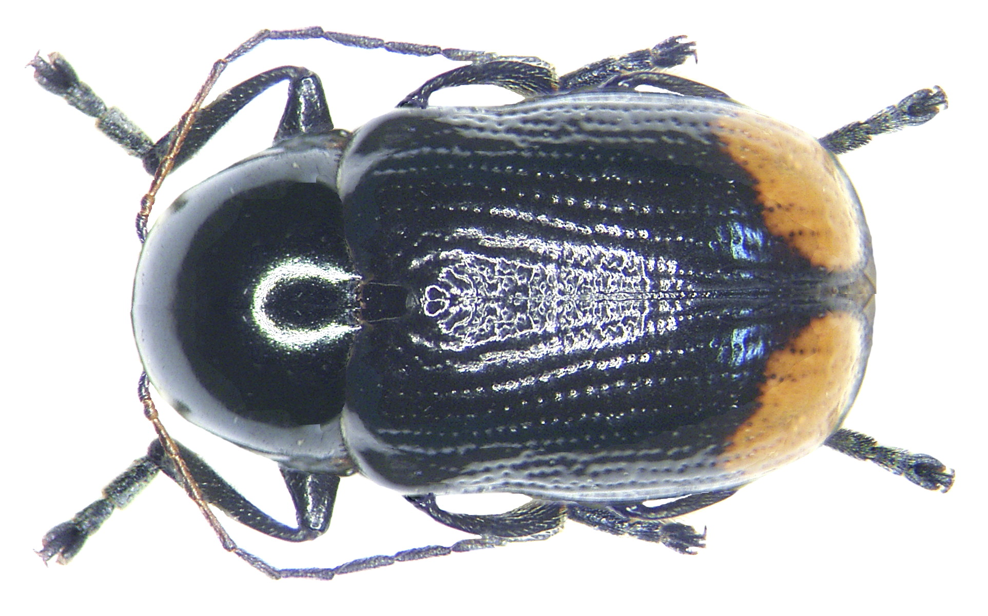 Cryptocephalus biguttatus (Scopoli, 1763) Familie: Chrysomelidae Grösse: 6-7 mm Verbreitung: Europa Fundort: Austria, Rosaliengebirge, Forchtenau leg.det. U.Schmidt, 1975 Foto: U.Schmidt, 2006